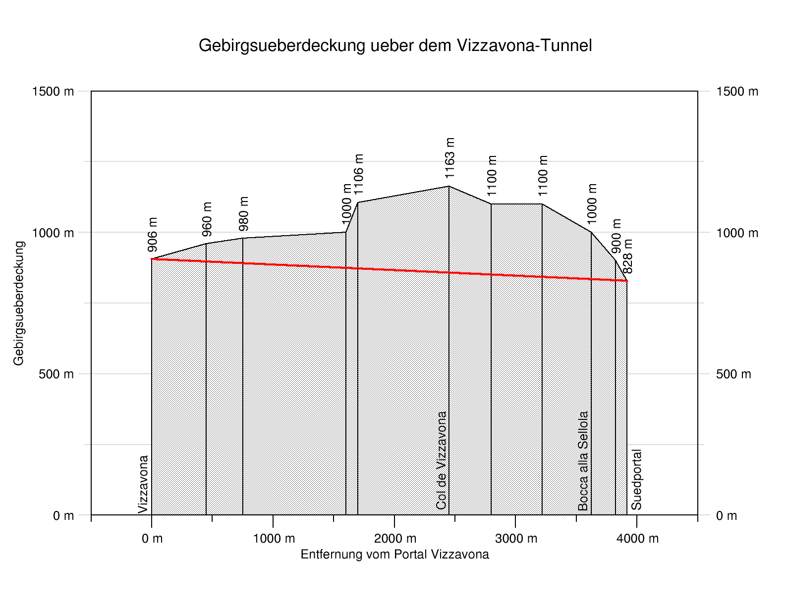 Gebirgsüberdeckung über den Vizzavona-Tunnel auf Korsika